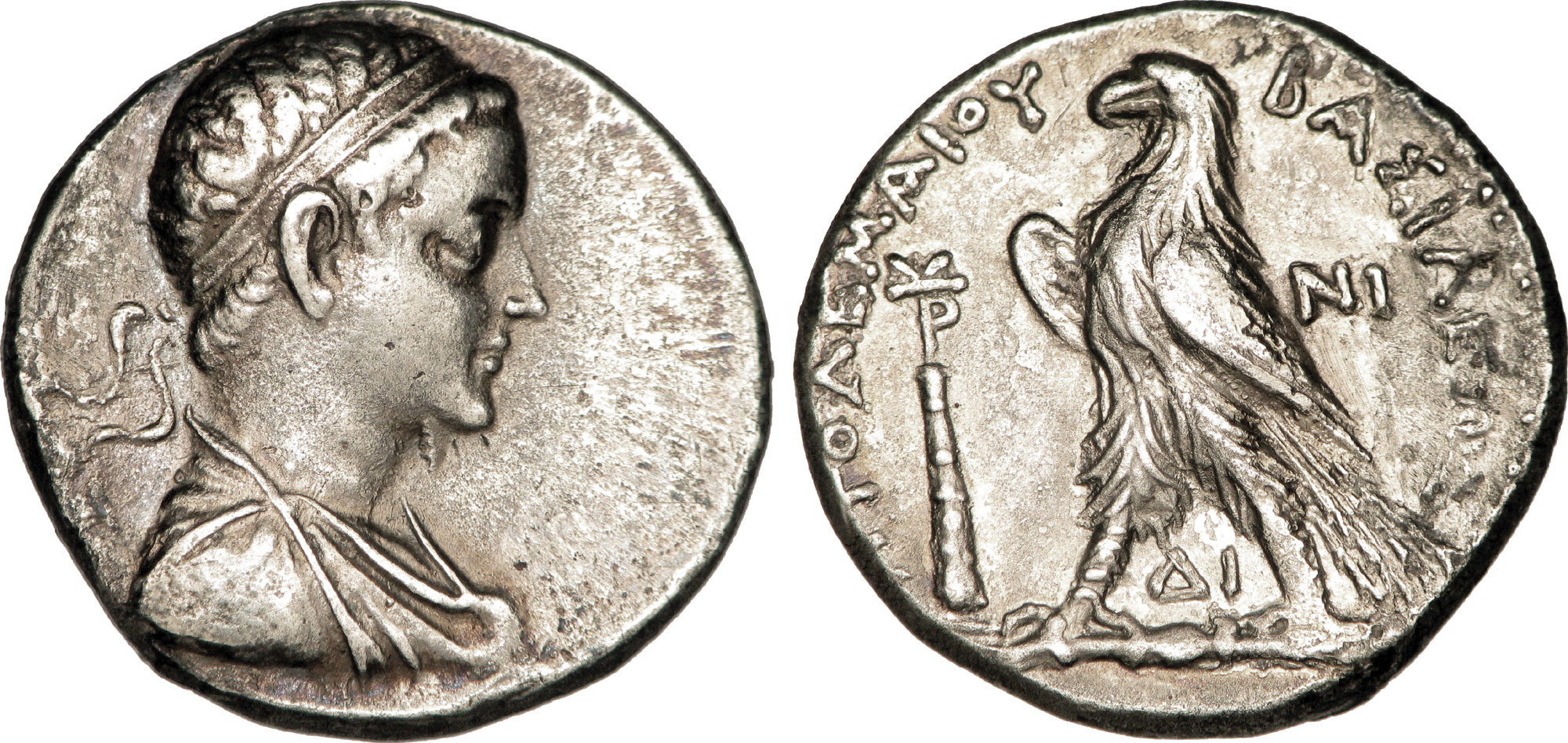 Nom de l'atelier : Phénicie, Tyr Métal : argent Diamètre : 24,00mm Axe des coins : 12h. Poids : 13,71g. Titulature avers : Anépigraphe. Description avers : Buste de Ptolémée V diadémé et drapé à droite ; grènetis circulaire perlé. Description revers : Aigle debout à gauche sur un foudre, les ailes repliées ; dans le champ à gauche, une massue posée verticalement surmontée du monogramme de Tyr ; un monogramme dans le champ à droite, un autre entre les pattes de l’aigle. Légende revers : PTOLEMAIOU - BASILEWS/ (TUR) - NI/ DI. Traduction revers : (de Ptolémée roi).